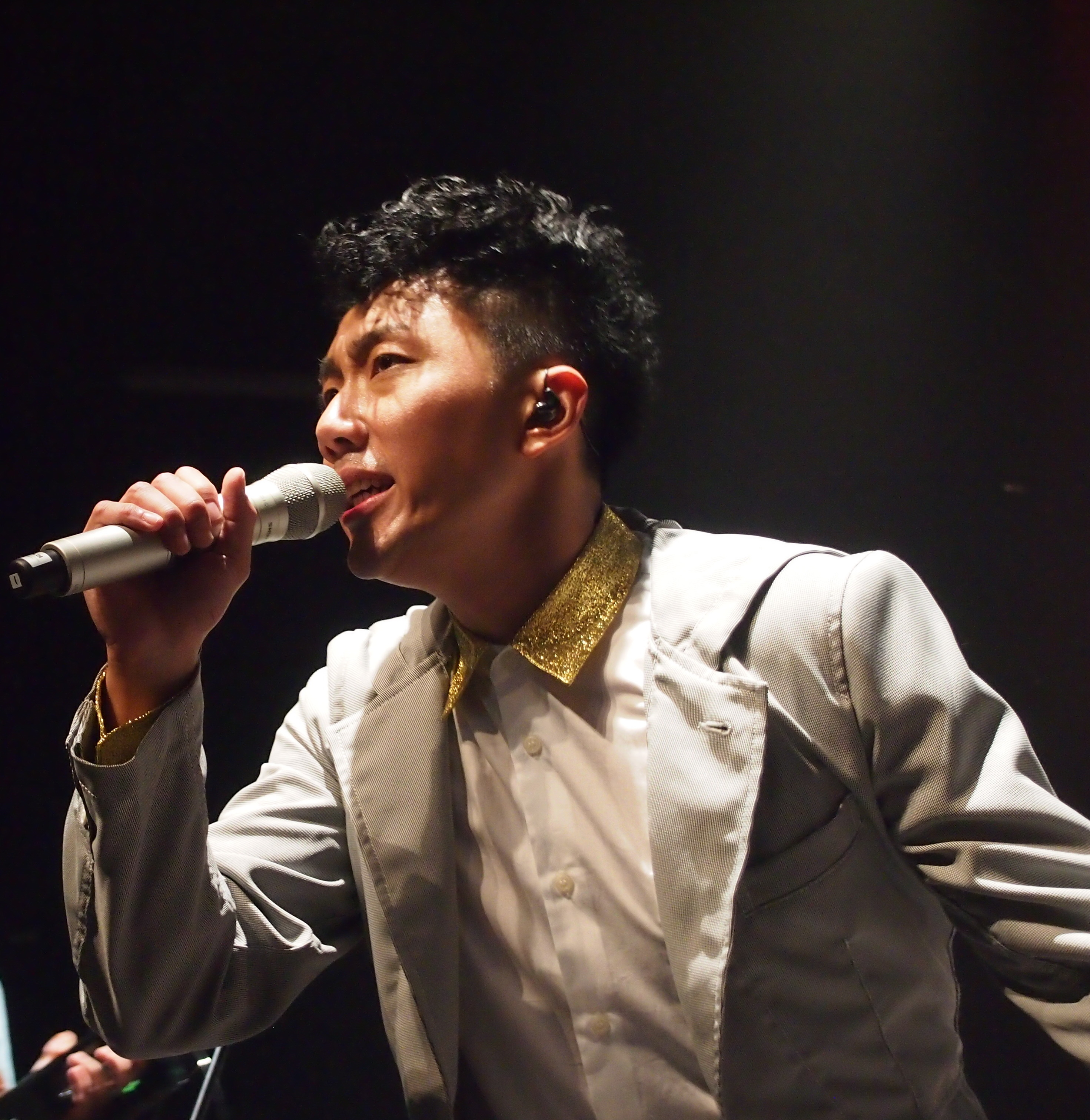 劉浩龍小音樂會